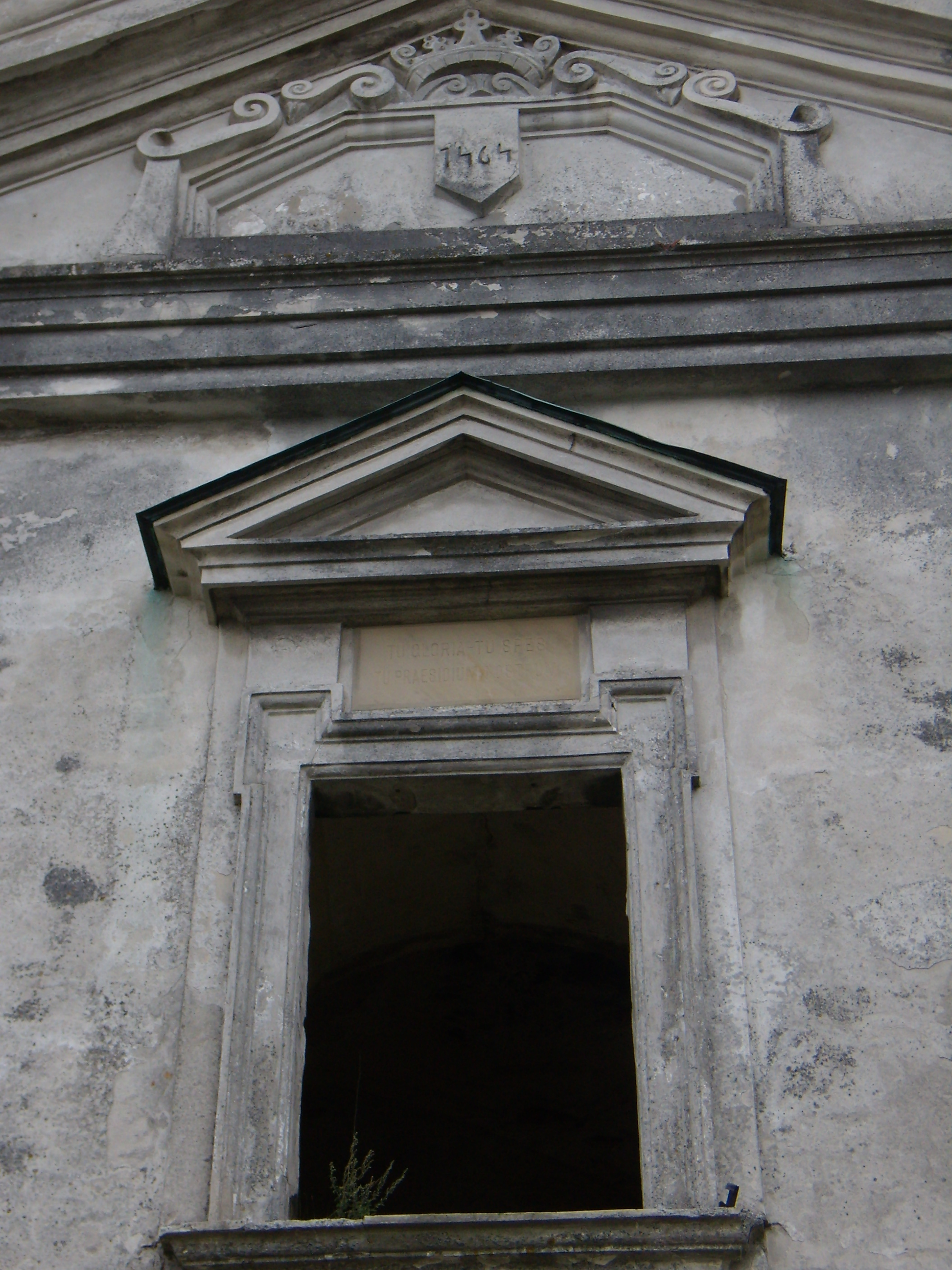 Монастир домініканів (мур.), Підкамінь